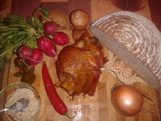 Pečené koleno